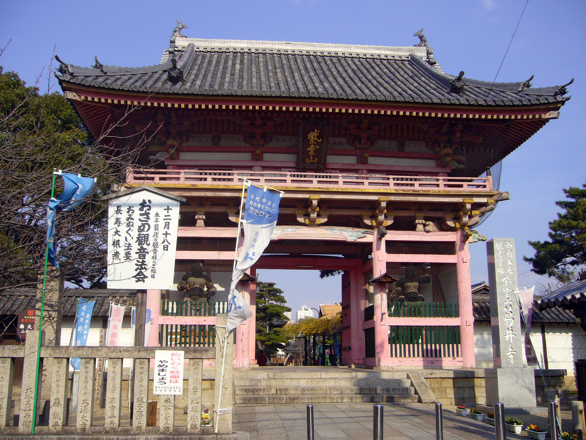 Fujiidera in Fujiidera, Osaka, Japan